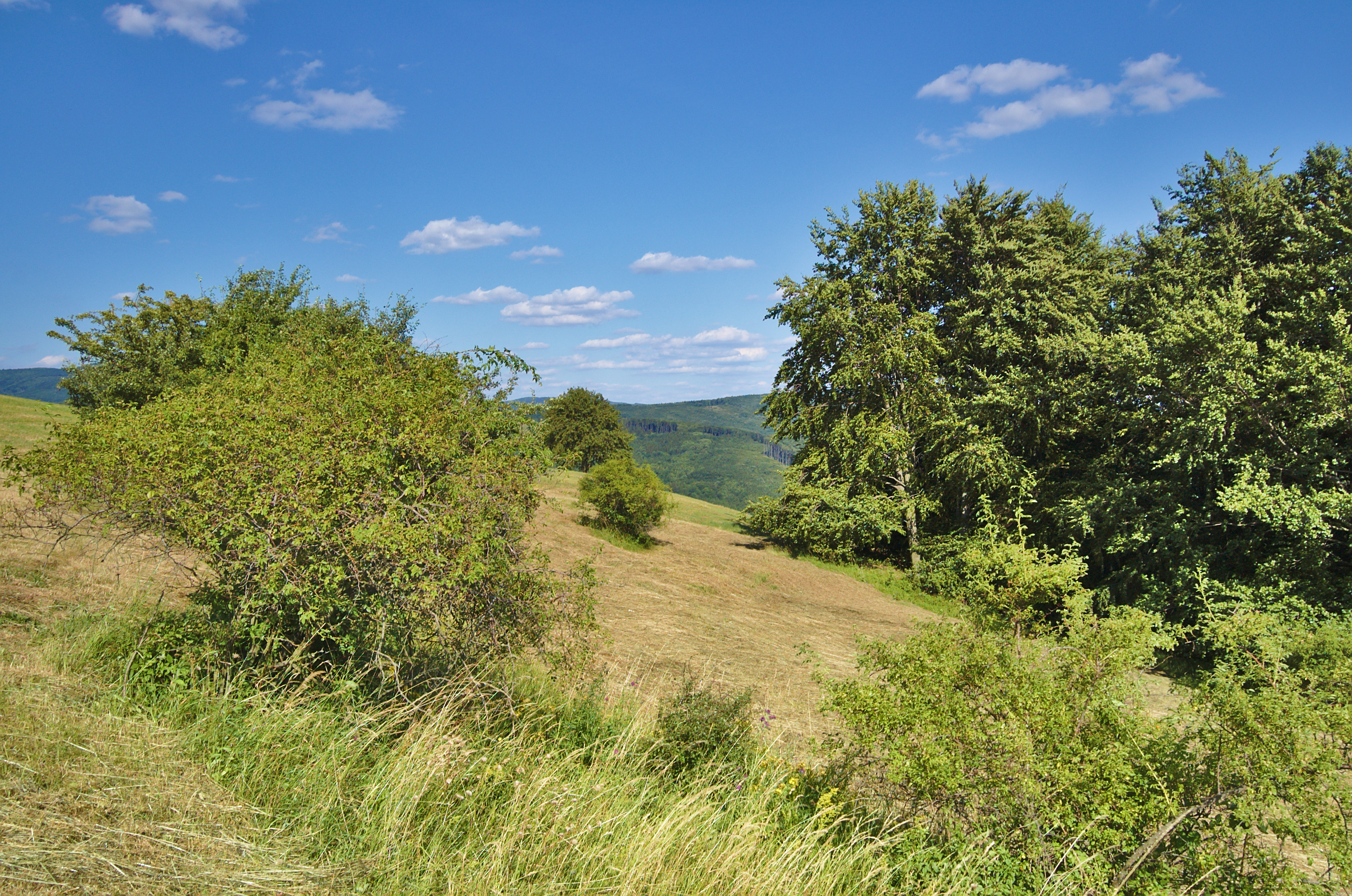 Přírodní památka Mechnáčky, okres Uherské Hradiště